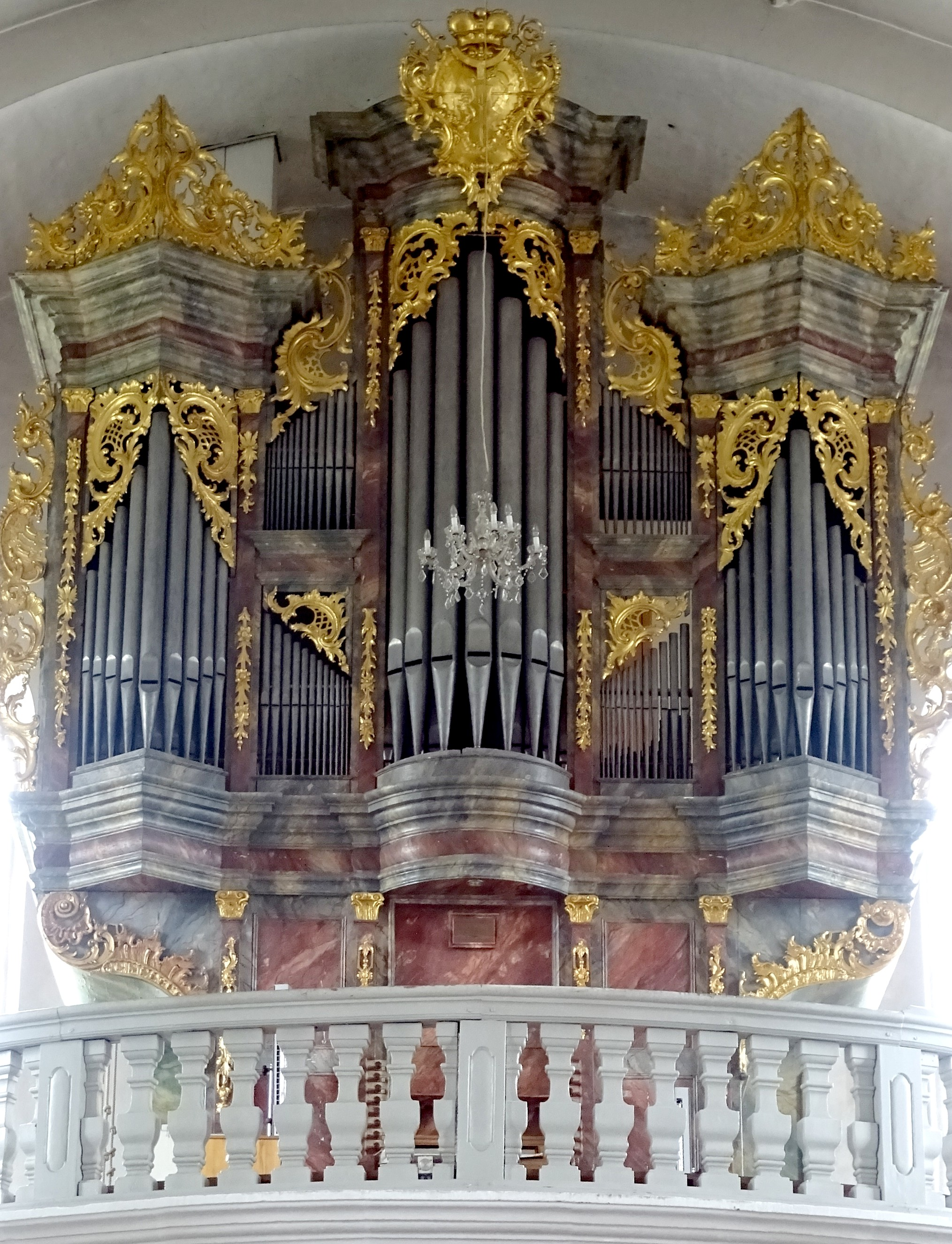 Historische Seuffert-Orgel in der Wallfahrtskirche Mariä Heimsuchung LImbach